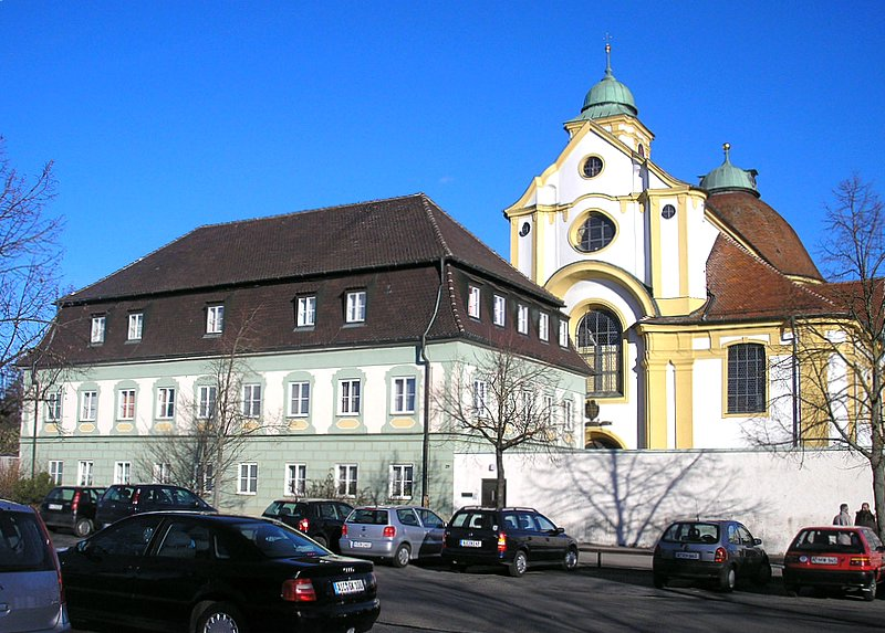 Wallfahrtskirche Herrgottsruh (Friedberg, Landkreis Aichach Friedberg, Bayerisch-Schwaben). Priesterhaus und Fassade. Eigene Aufnahme, Jan. 2007 / Pilgrimage church "Herrgottsruh" (Friedberg, Bavaria, Germany). House of the priest and facade. Own photo, Jan. 2007